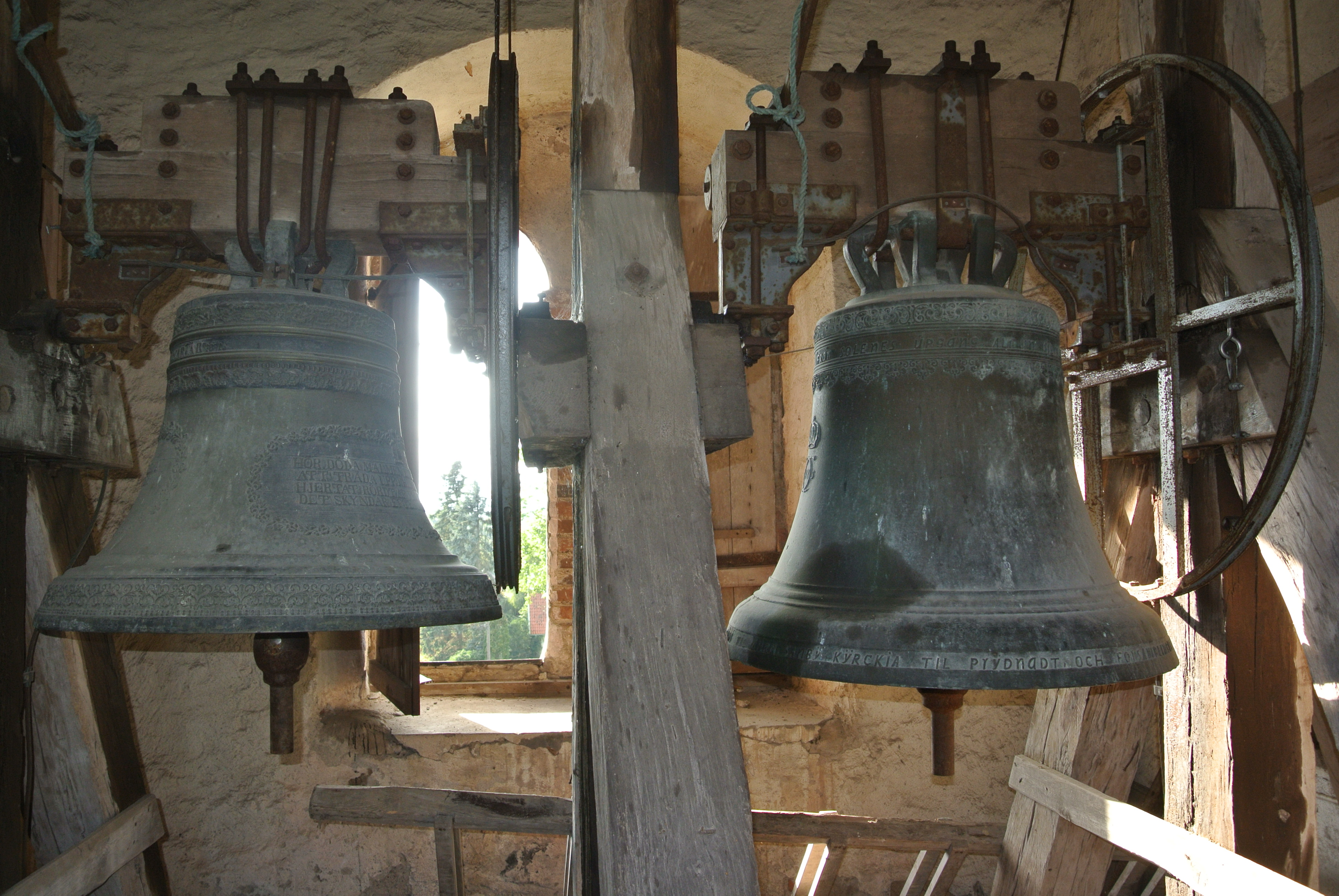 Norra Sandby kyrkas klockor. Storklockan är från år 1698 och lillklockan är gjuten år 1871 i Kalmar